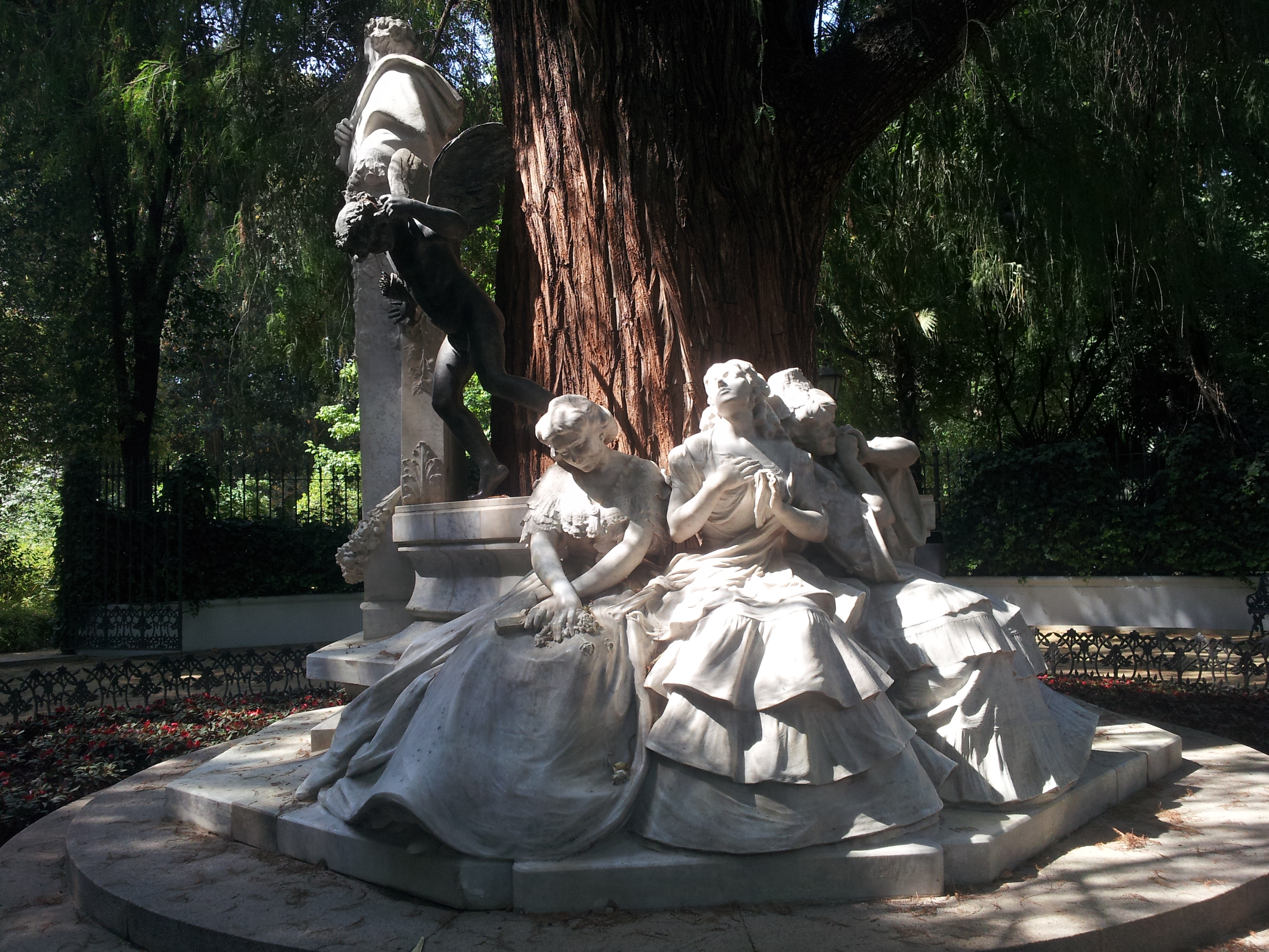 Monumento a Gustavo Adolfo Bécquer en el parque de María Luisa (Sevilla); Representación del "amor ilusionado", el "amor poseído" y el "amor perdido" a la derecha del busto del Poeta según el observador.